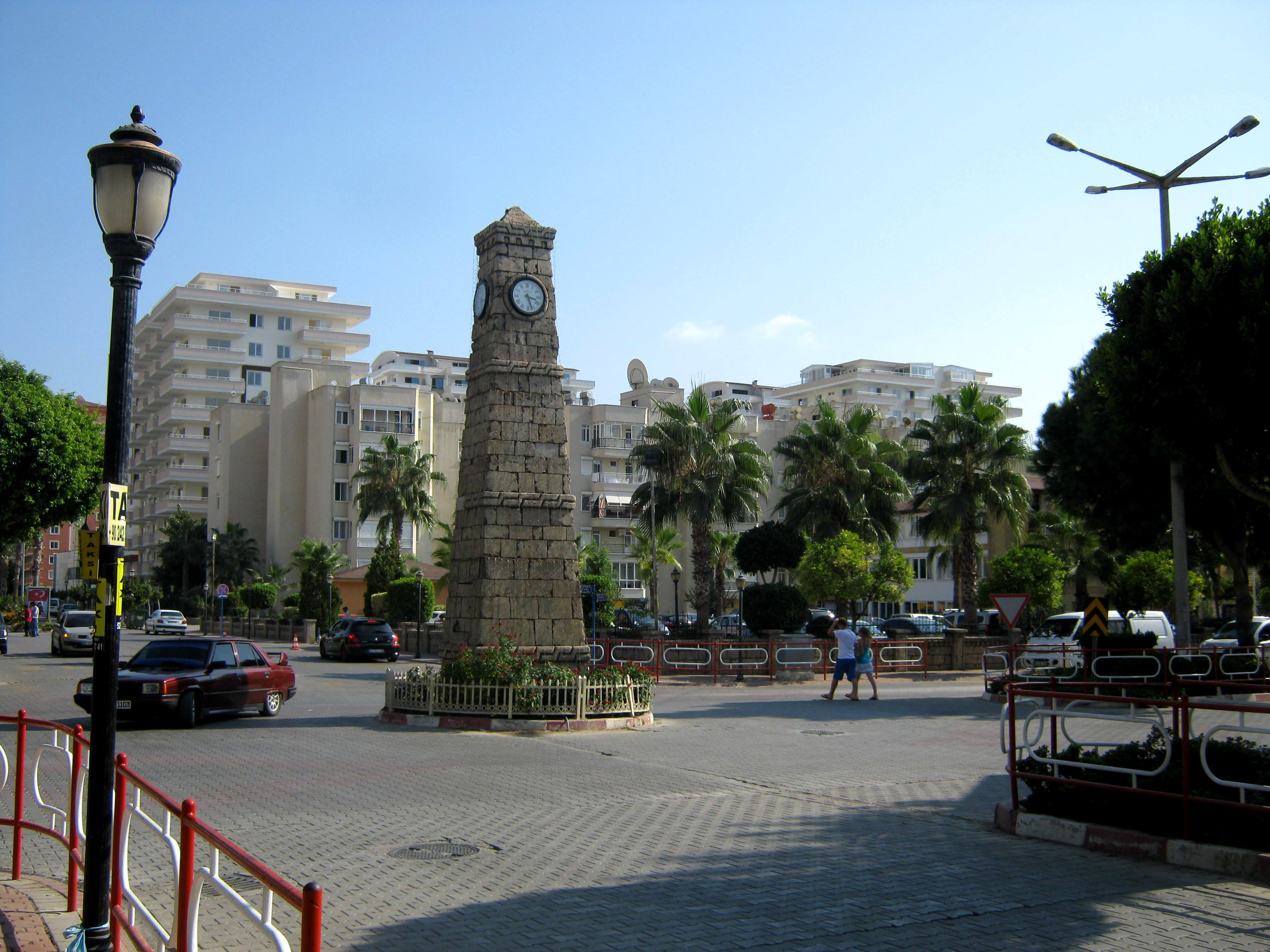 Часы на бульваре Мендерес (Махмутлар (Турция))